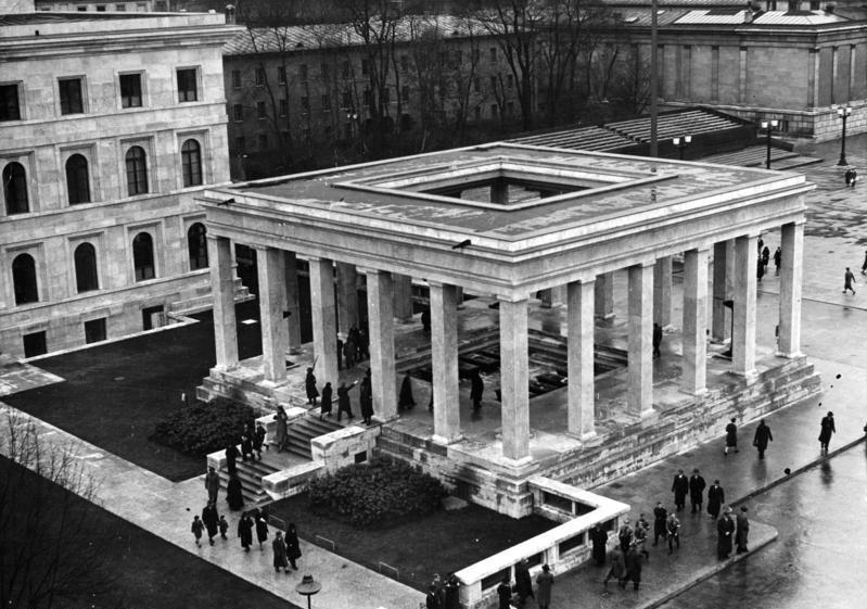 München, Königsplatz, Ehrentempel Feierlichkeiten zum 9. November in München. Ehrentempel auf dem Königsplatz.